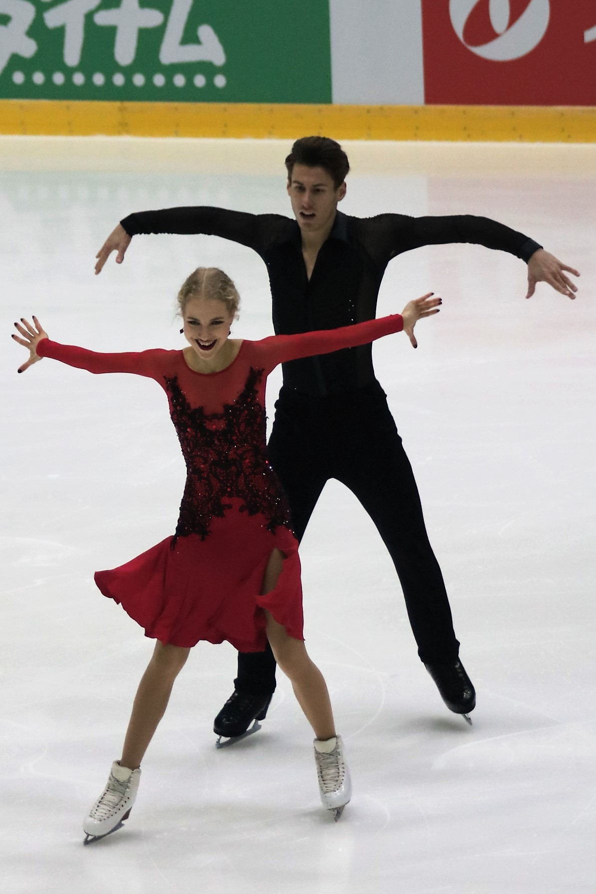 Юулия Турккила / Маттиас Верслуйс (Финляндия) на Гран-при Хельсинки 2018